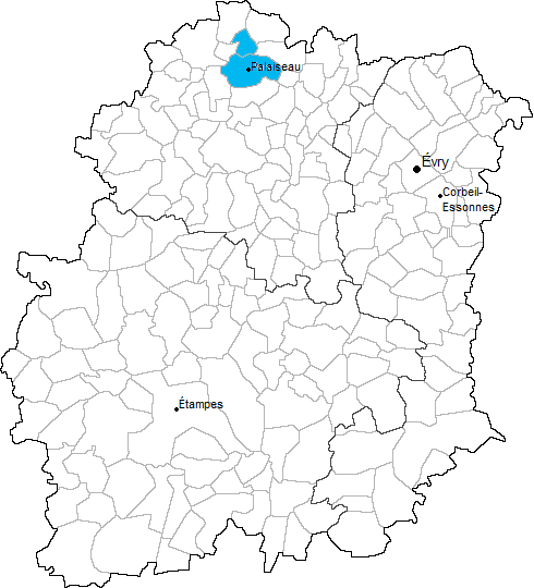 Carte de situation du canton de Palaiseau dans le département de l'Essonne (91)